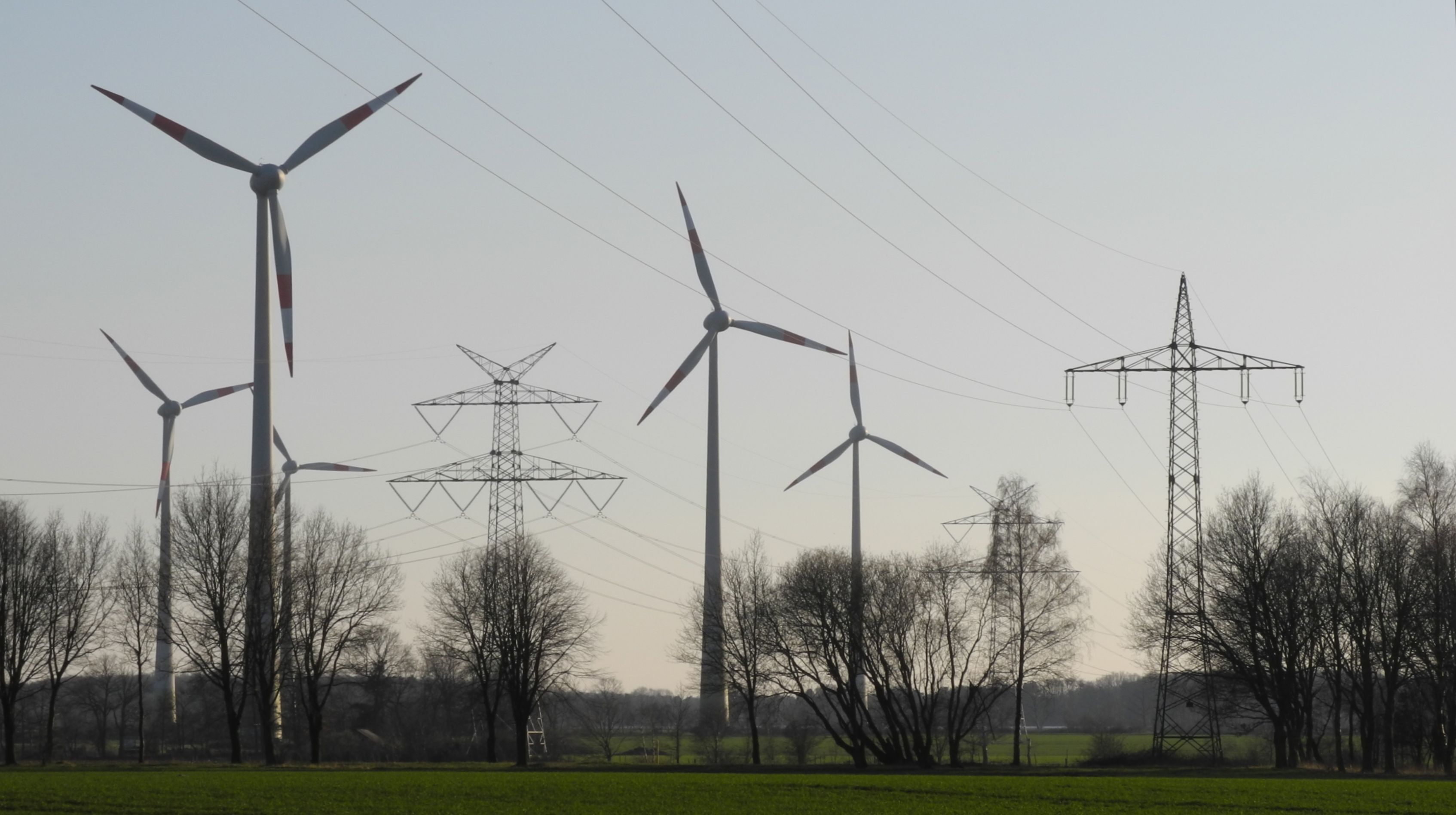 Horneburg - Windräder und Stromleitungen